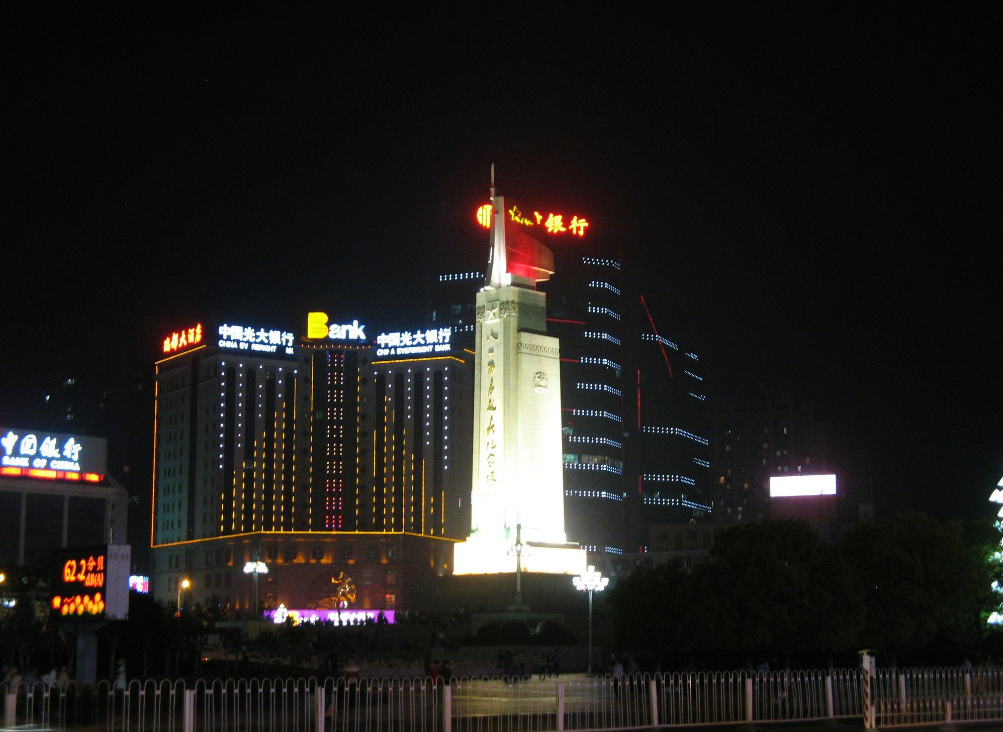 八一广场，南昌 NanChang, JiangXi Province 22/04/12